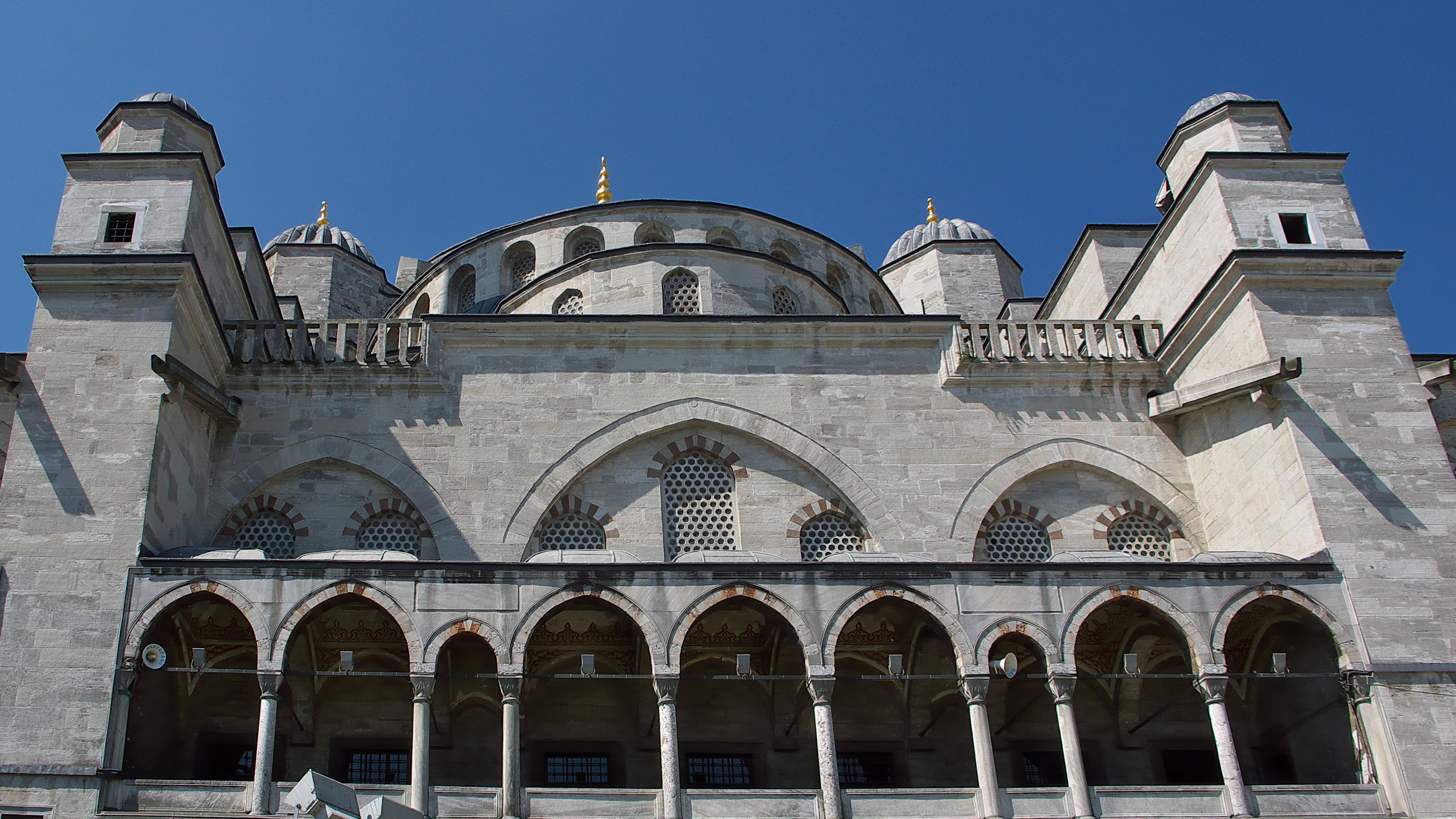 La mezquita de Sedefkar Mehmed Agha (Sedefkâr Mehmet Ağa) (1609-1616)